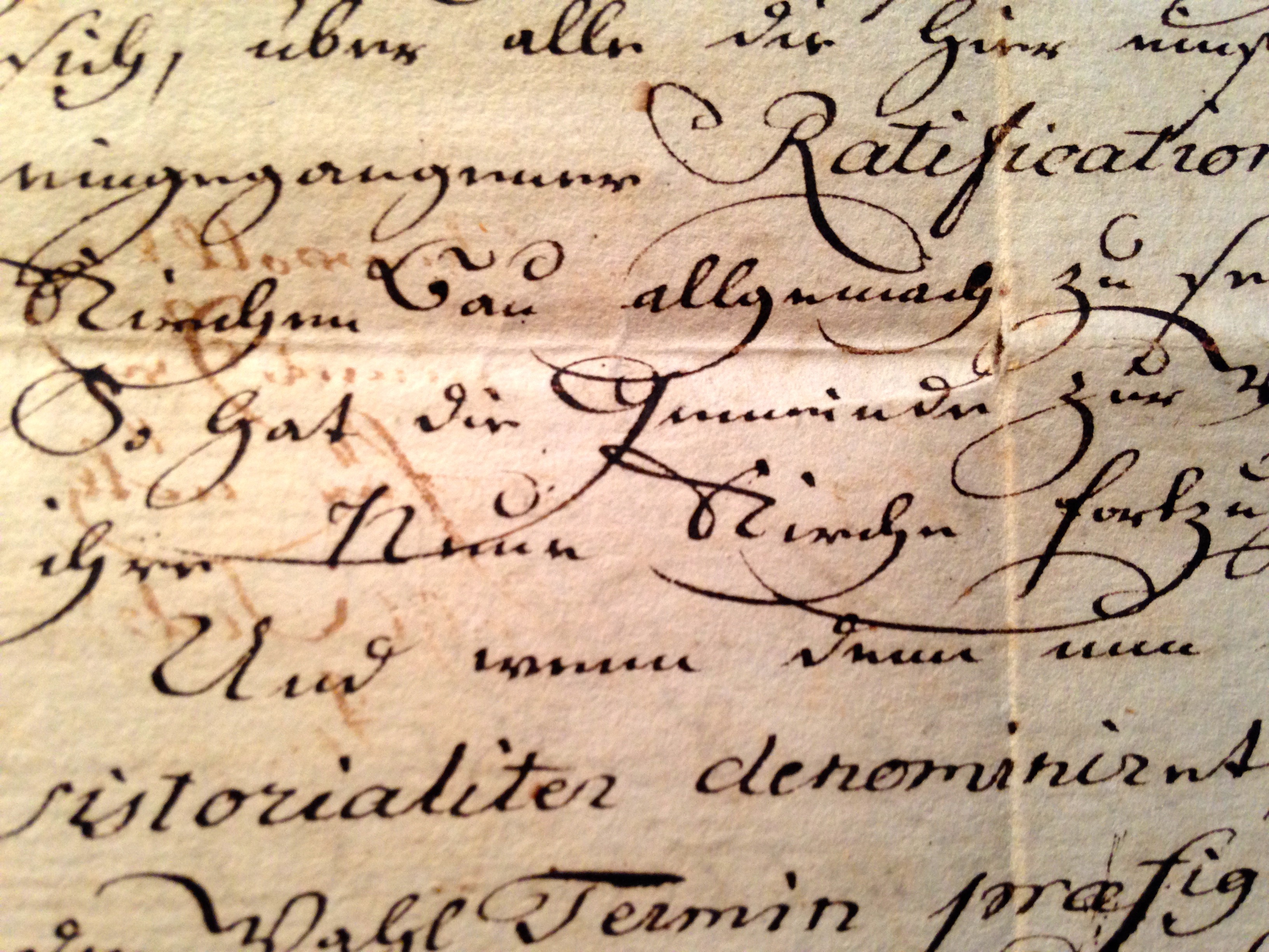 Detail mit Erwähnung der "Neuen Kirche" (heute: Evangelische Stadtkirche Monschau)